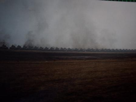 Esercitazione tattica con realizzazione di muro d'acciaio con carri armati italiani - Aviano 1985